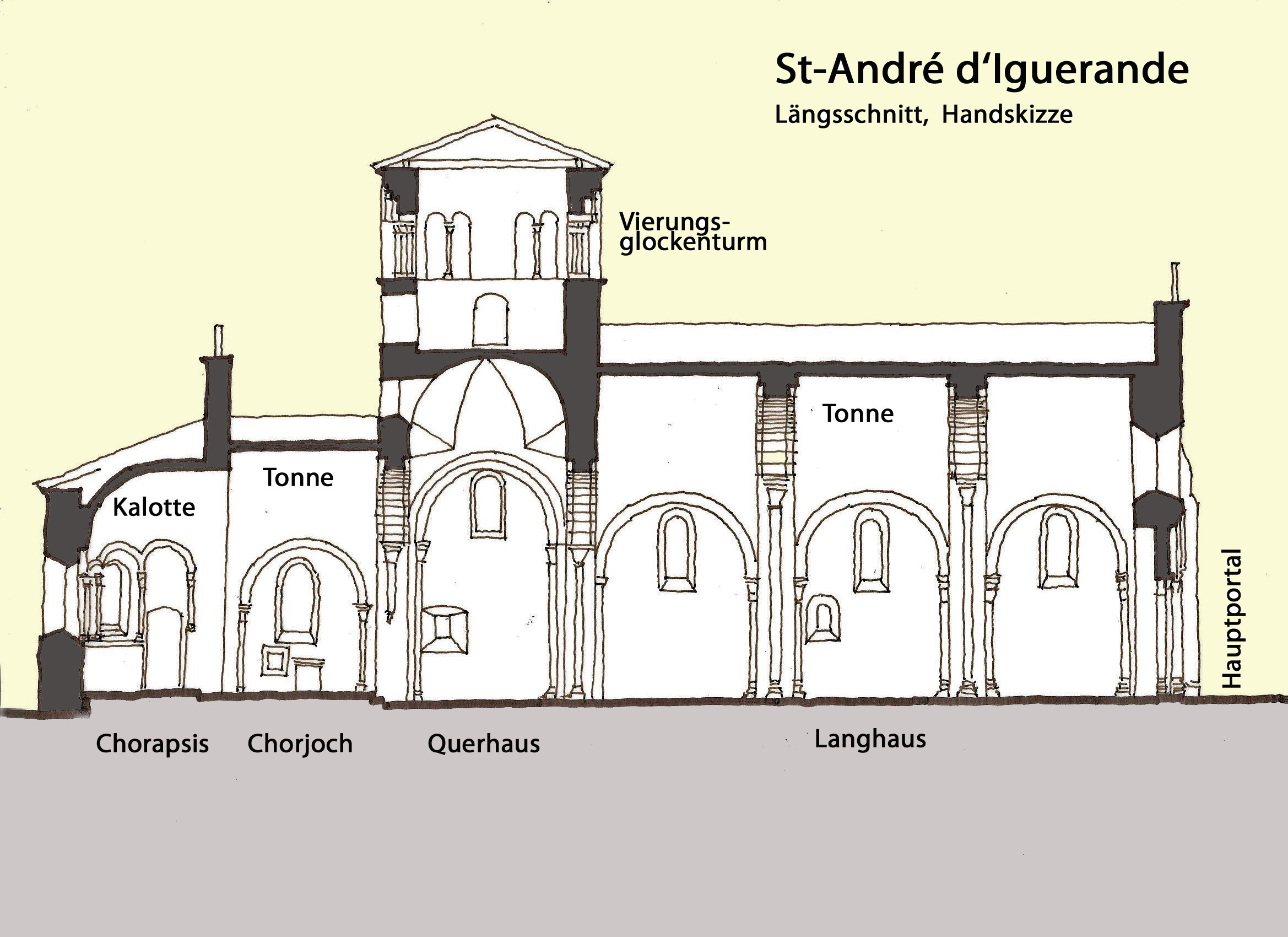 St-André_d'Iguerande.Längsschnitt, Handskizze